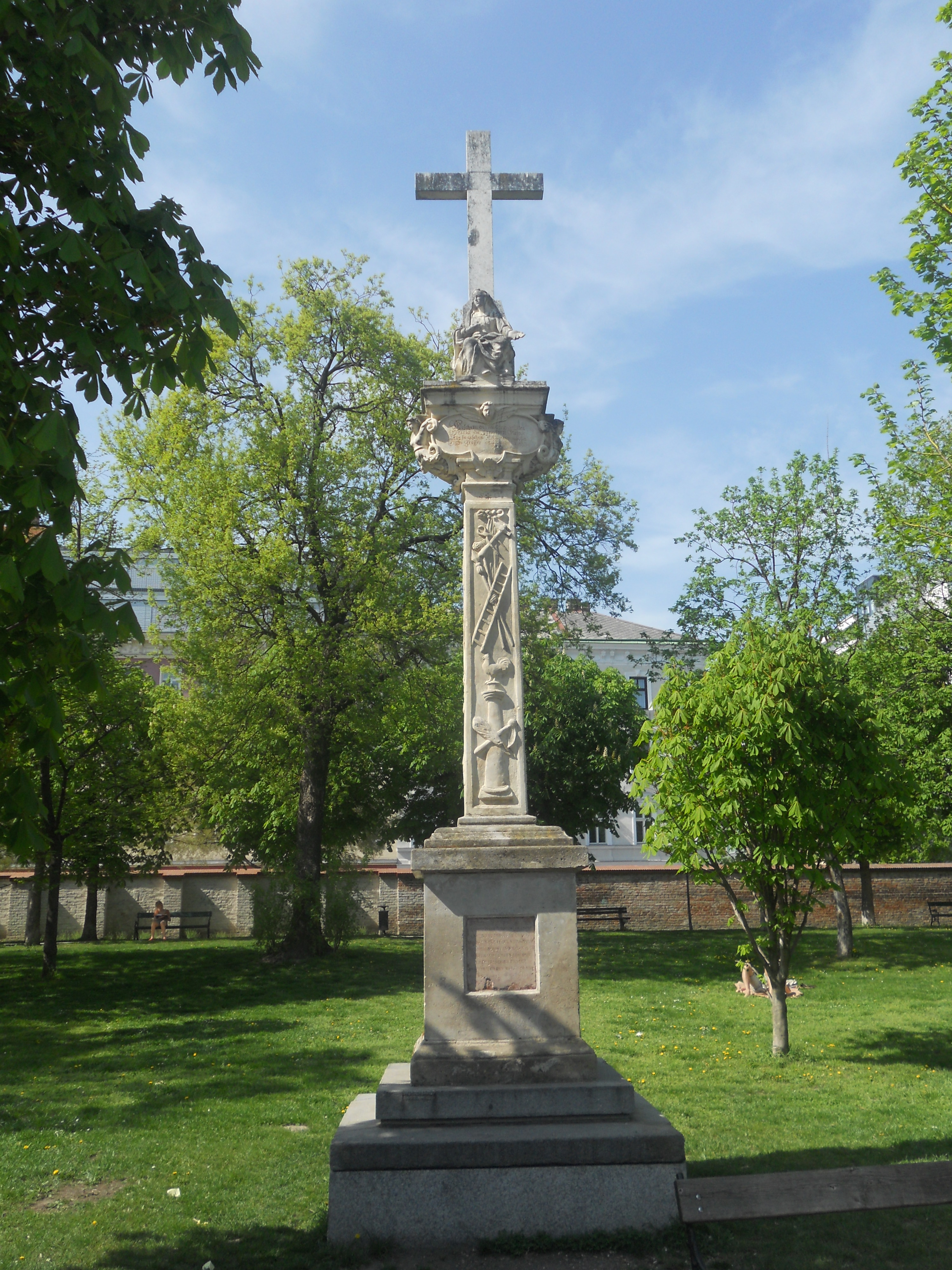 Schmidtsches Votivkreuz im Augarten